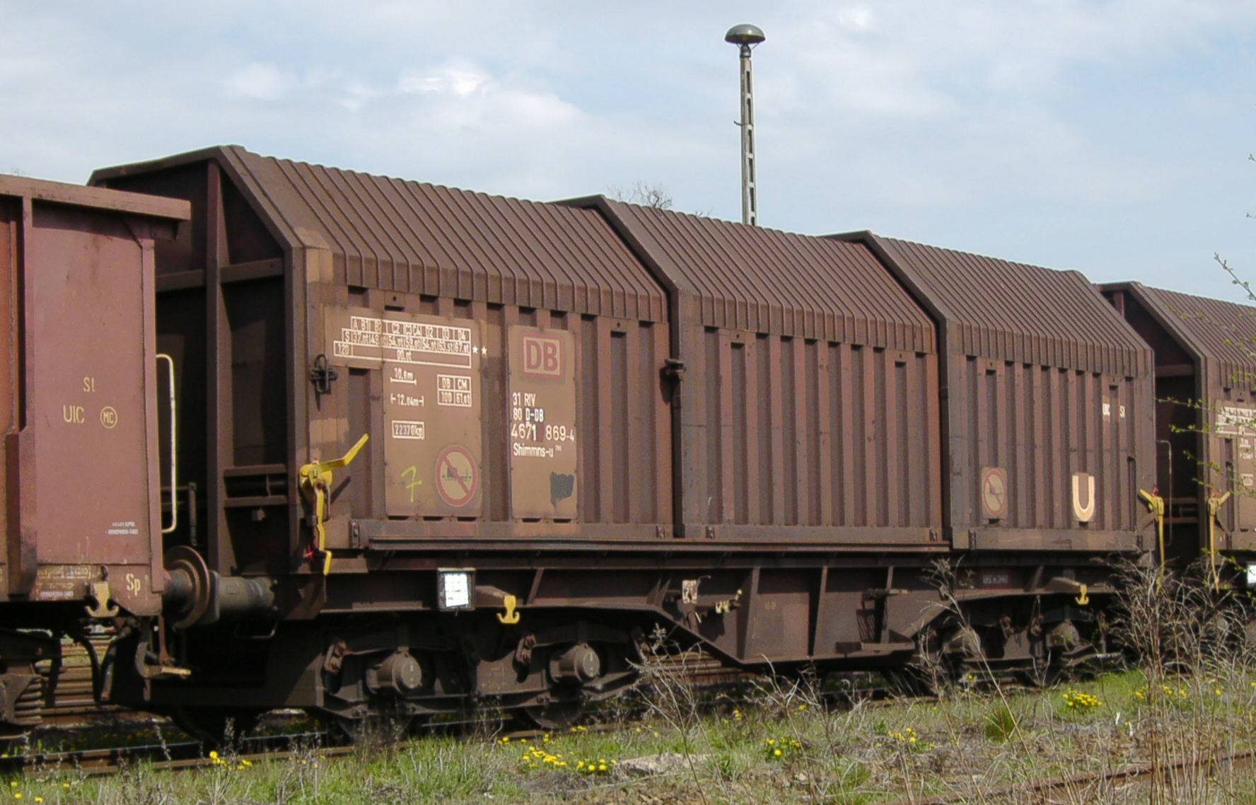 Shimmns-u708 der DB: Vierachsiger UIC-Standardwagen (Flachwagen) für den Transport von Aluminiumcoils